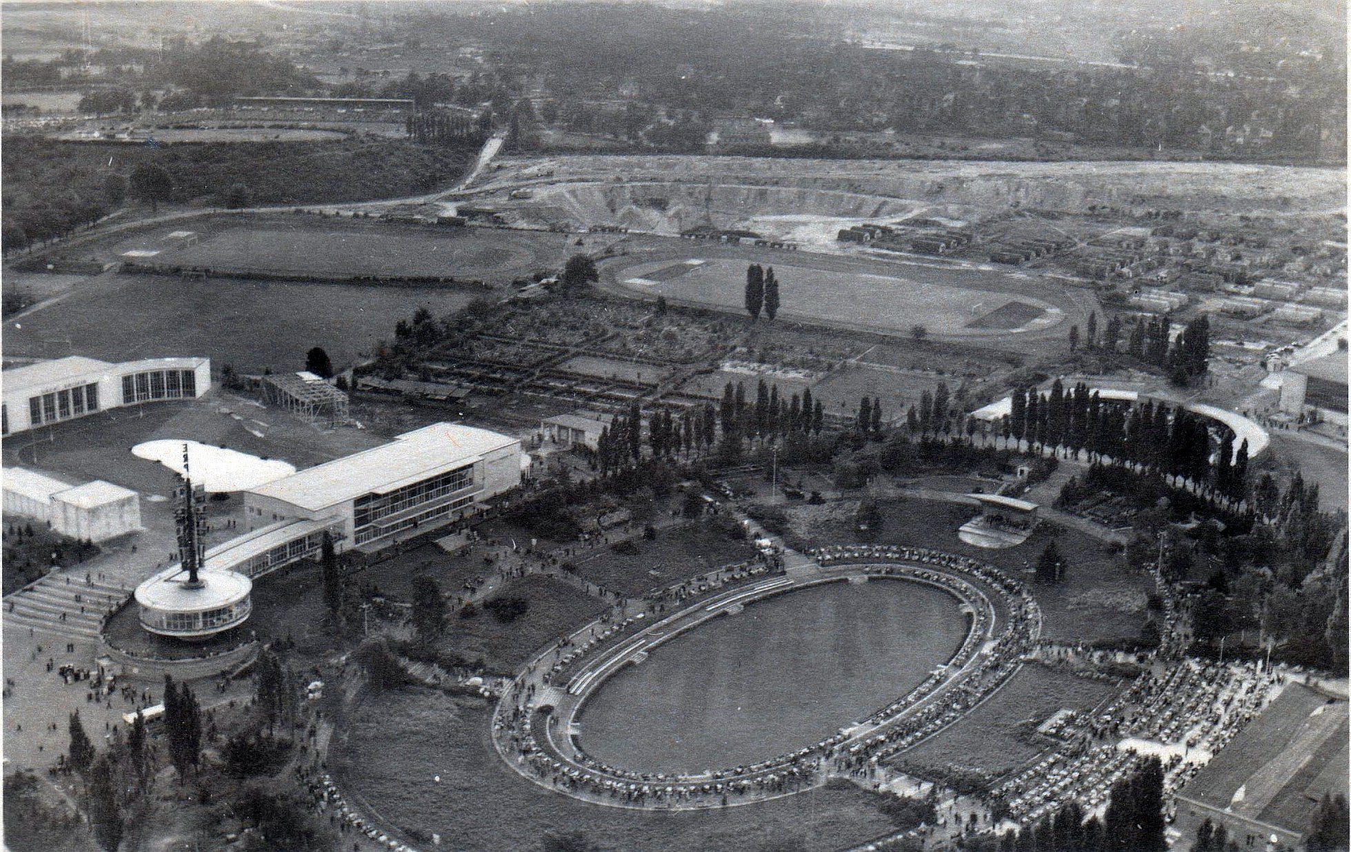 Blick vom Funkturm auf den Sommergarten, den Friedhof Eichkamp (Mitte) und im Hintergrund das Mommsenstadion